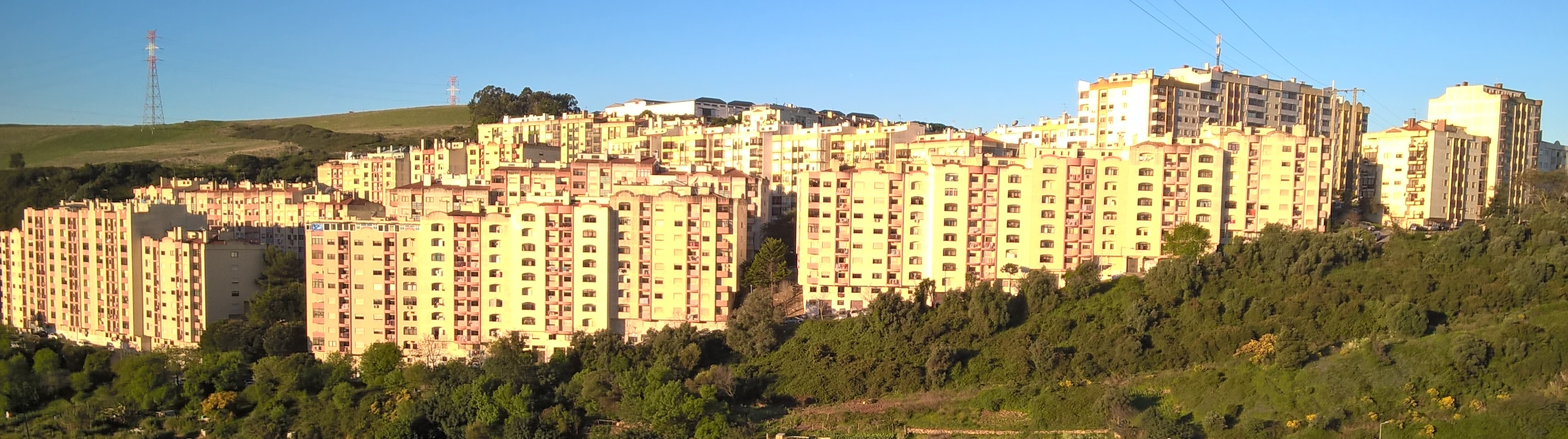 Bairro do Casal do Cotão visto da Agualva